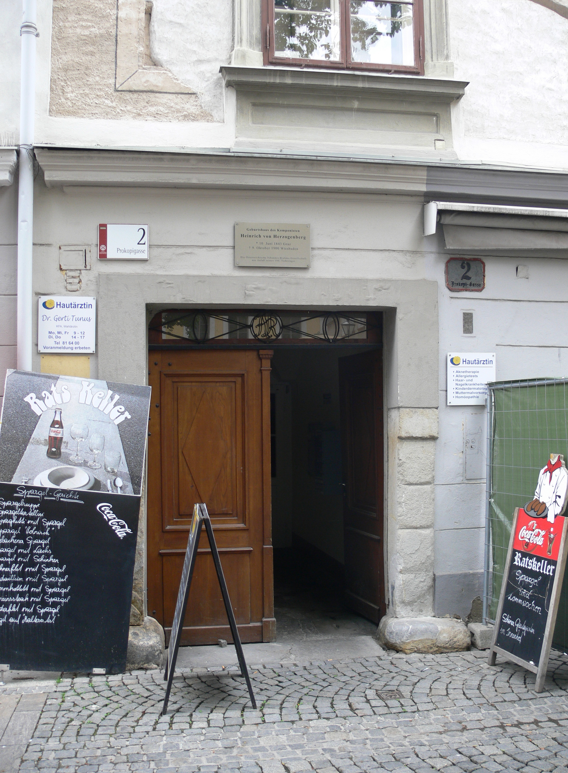 Graz, Prokopigasse 2, Geburtshaus des Komponisten Heinrich von Herzogenberg